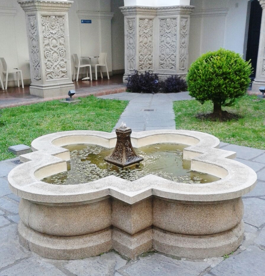 Museo Casa Ricardo Rojas